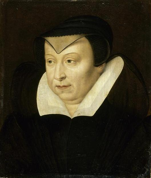 La regina Caterina de' Medici (1519-1589) ritratta nei suoi ultimi anni di vita.